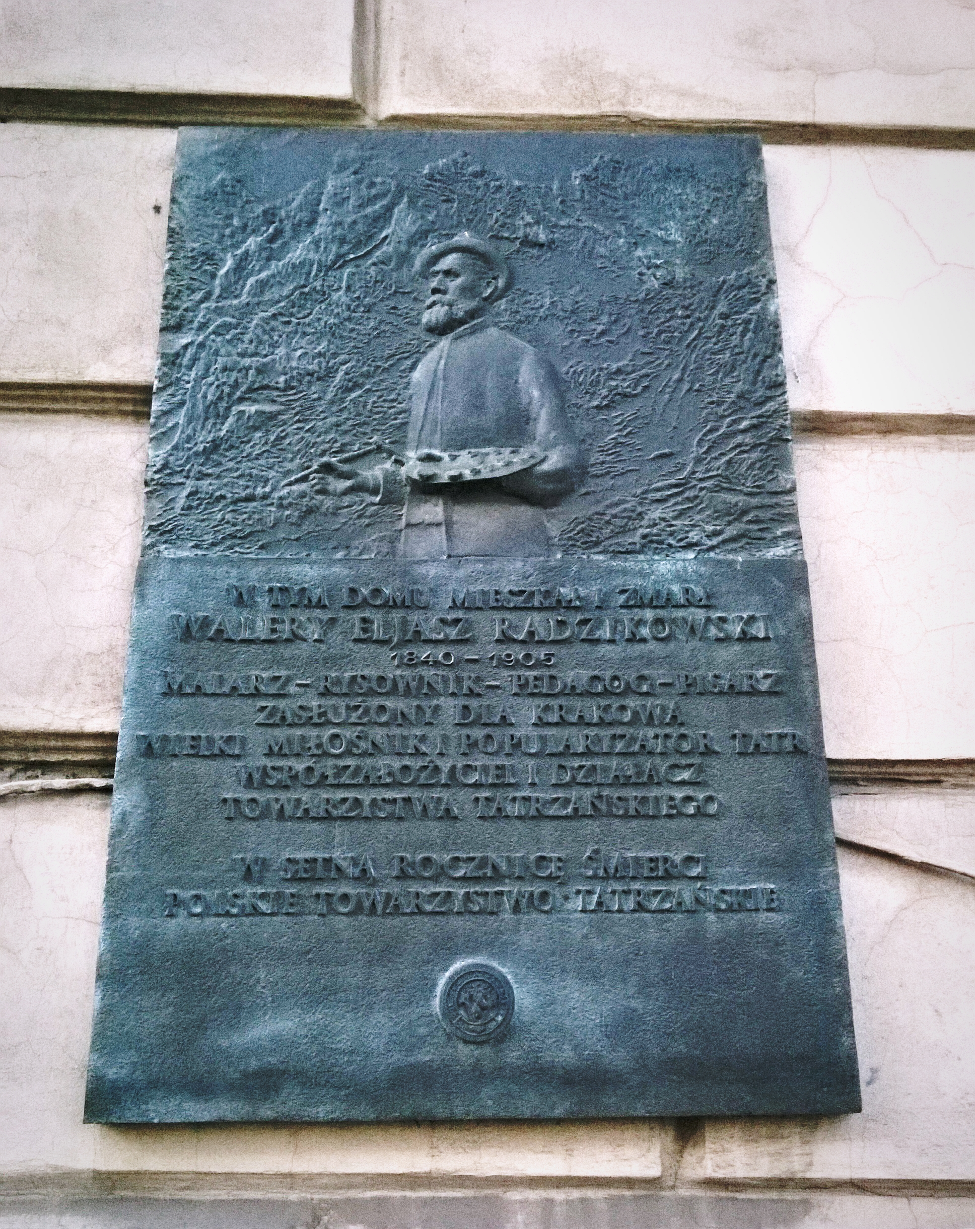 Tablica upamiętniająca malarza Walerego Eljasza-Radzikowskiego na kamienicy przy ul. Karmelickiej 23 w Krakowie.